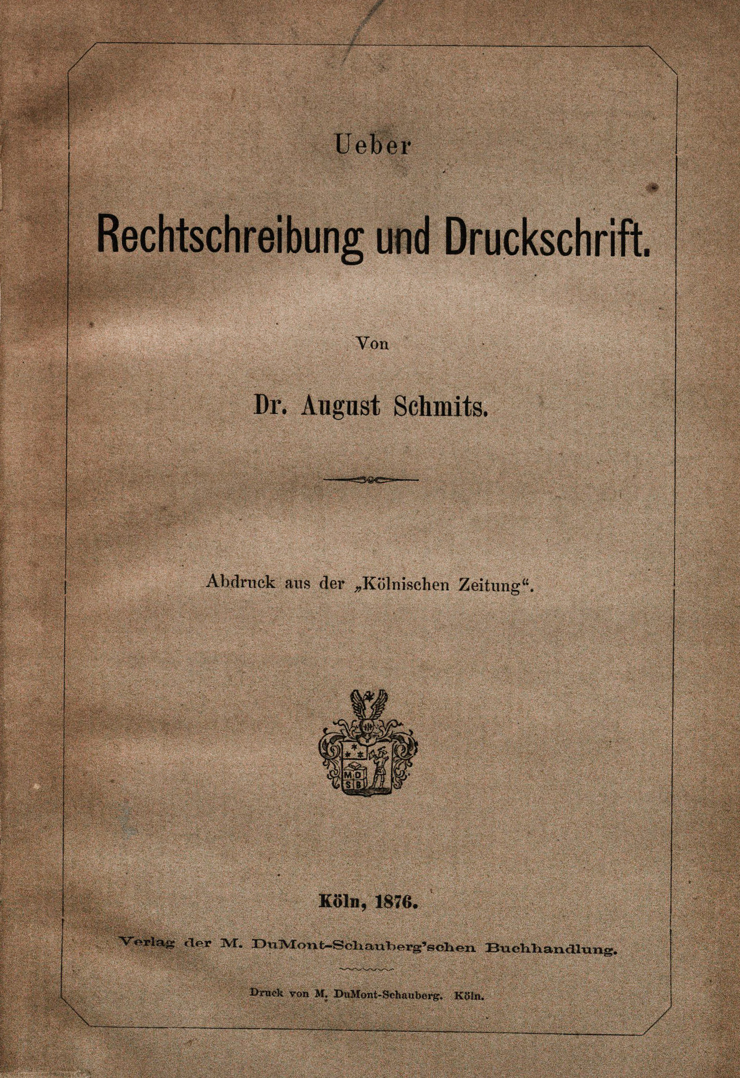 Titelblatt eines dünnen Buchs des DuMont-Schauberg'schen Verlags Köln zur Rechtschreibreform 1876: Rechtschreibung und Druckschrift von Dr. August Schmits.